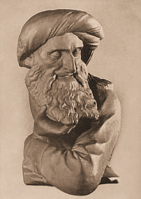 photographie d'un moulage en platre d'après un original perdu en 1870.